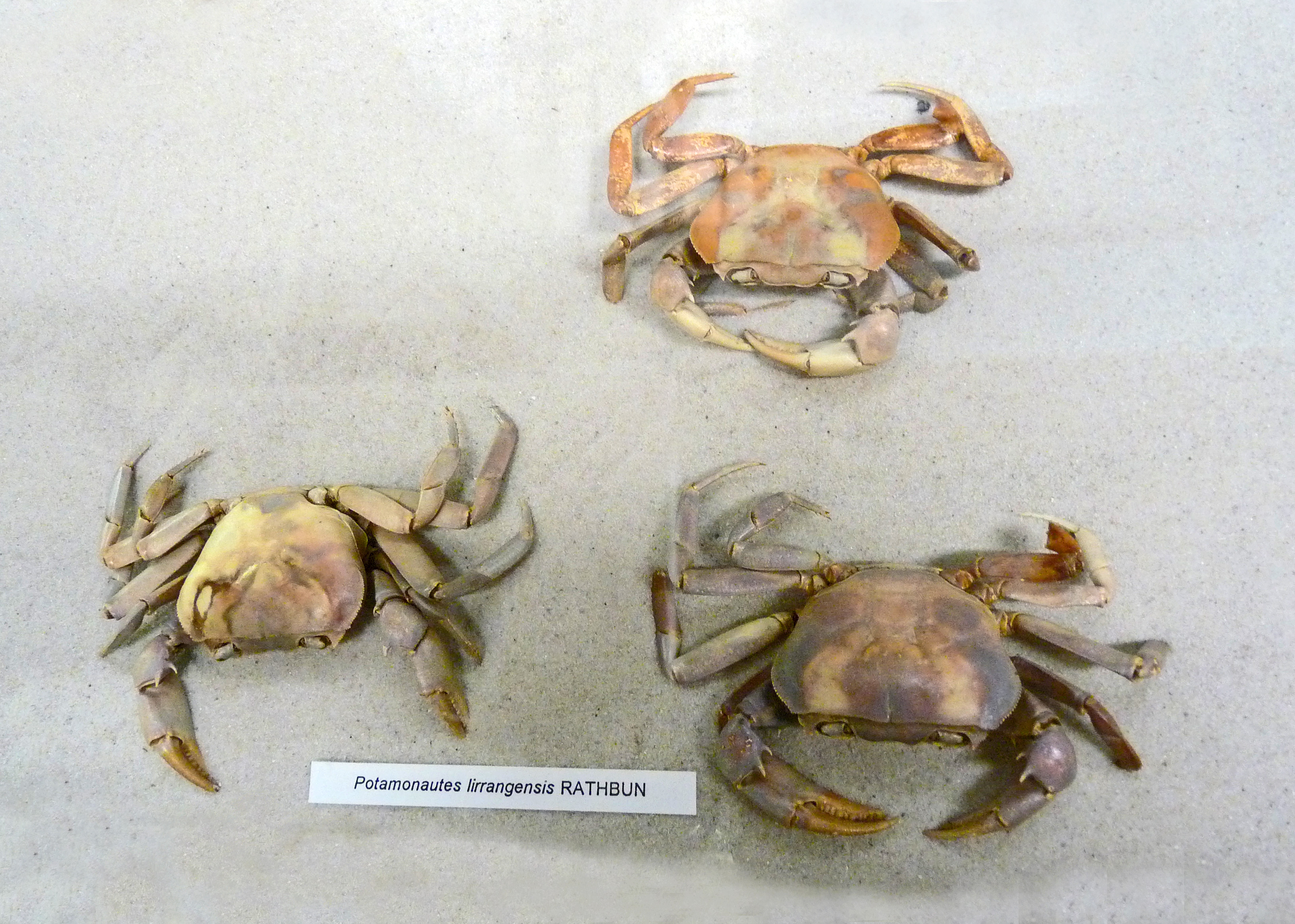 Potamonautes lirrangensis au Musée royal de l'Afrique centrale